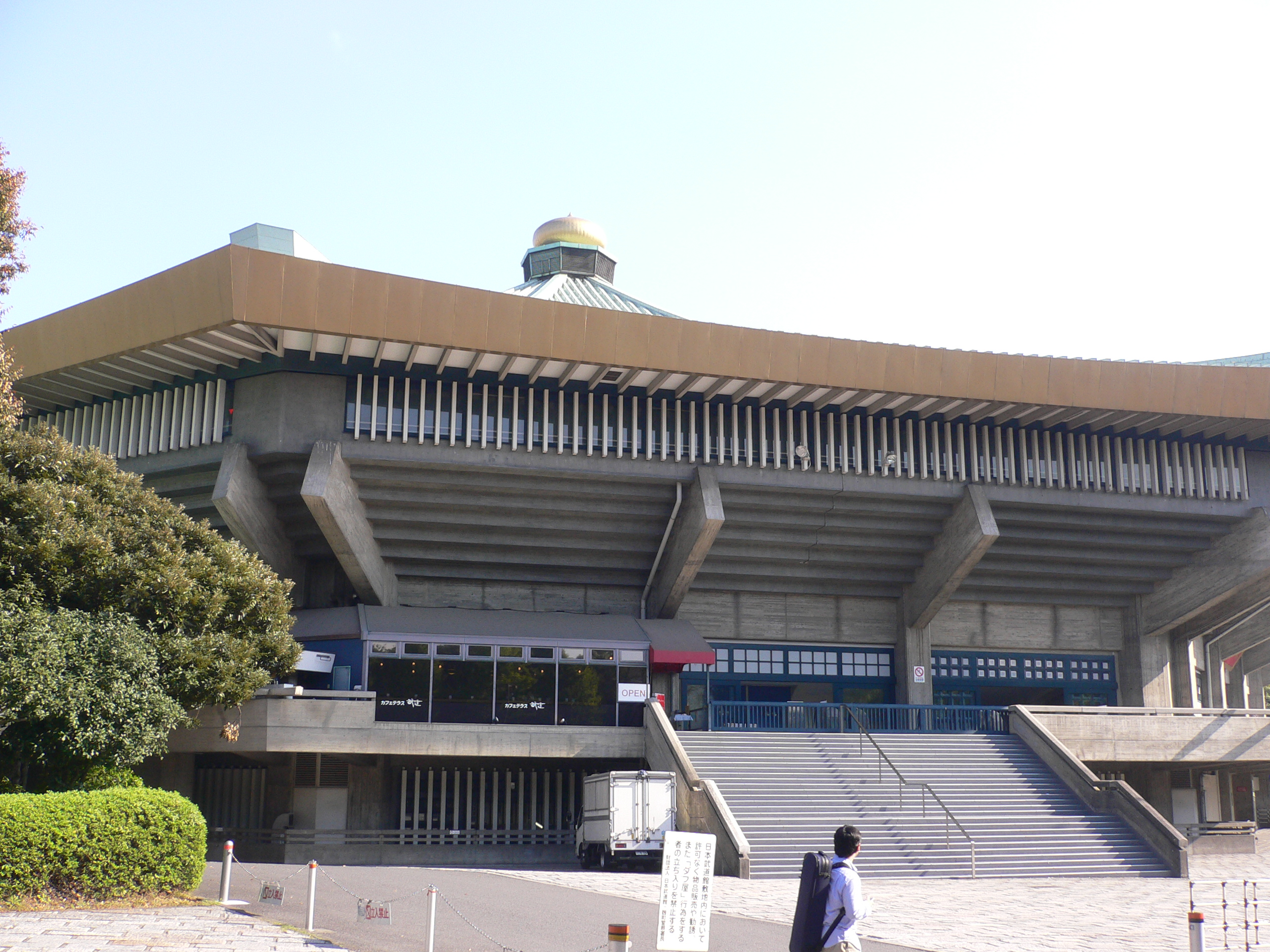 日本武道館